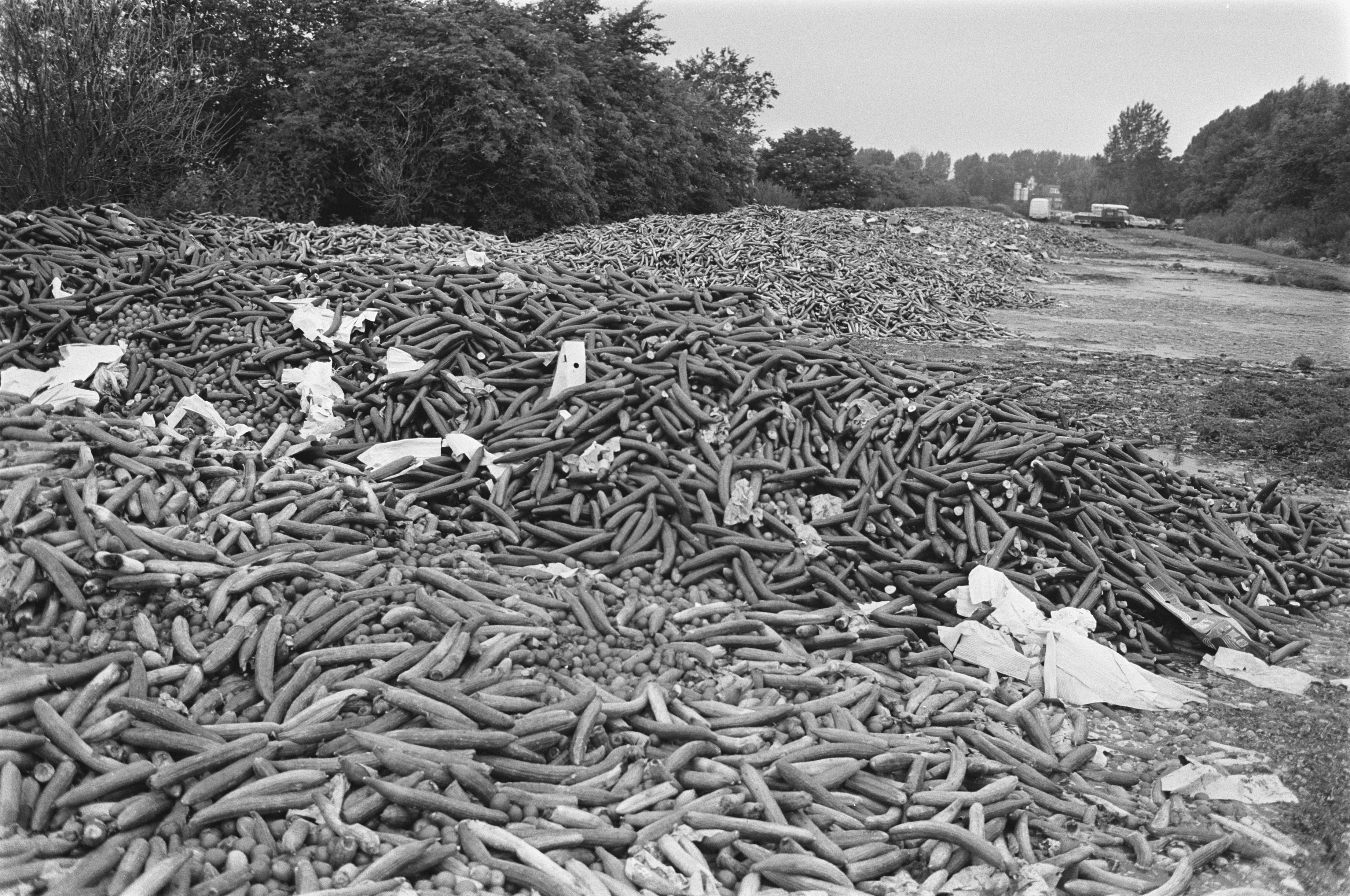 Collectie / Archief : Fotocollectie Anefo Reportage / Serie : [ onbekend ] Beschrijving : Doorgedraaide komkommers en tomaten op stortplaats van veiling Bleiswijk Datum : 11 juli 1984 Locatie : Bleiswijk Trefwoorden : stortplaatsen, veilingen Fotograaf : Antonisse, Marcel / Anefo Auteursrechthebbende : Nationaal Archief Materiaalsoort : Negatief (zwart/wit) Nummer archiefinventaris : bekijk toegang 2.24.01.05 Bestanddeelnummer : 933-0308